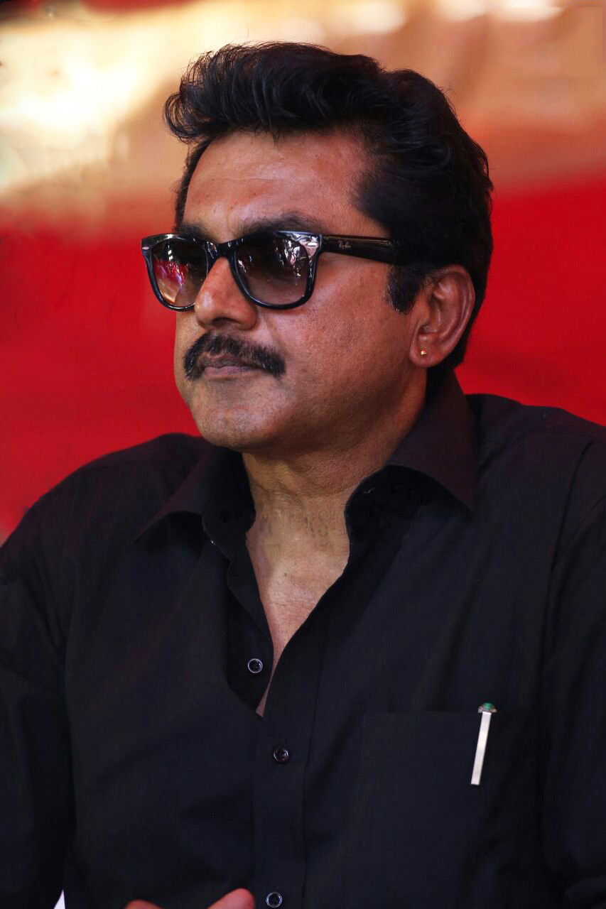 R Sarathkumar at Tamil Film Industry Hunger Strike